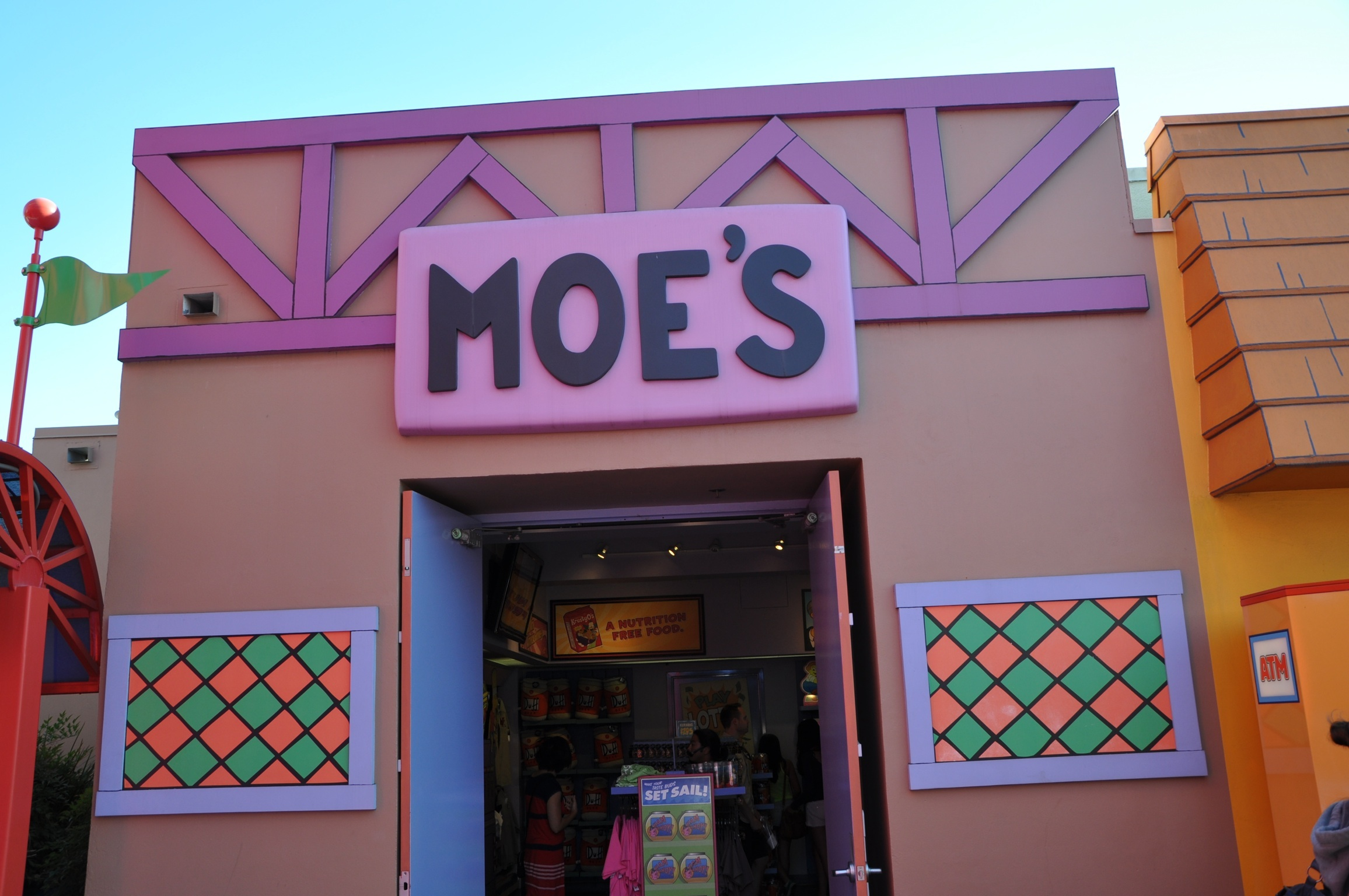 Le bar de moe (série télévisé The Simpsons) a universal studio a Los Angeles.